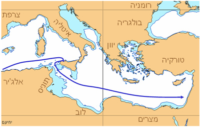 אוניית המעפילים יהודה הלוי - מסלול